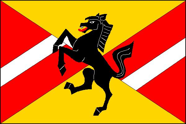 Vlajka obce Ludíkov